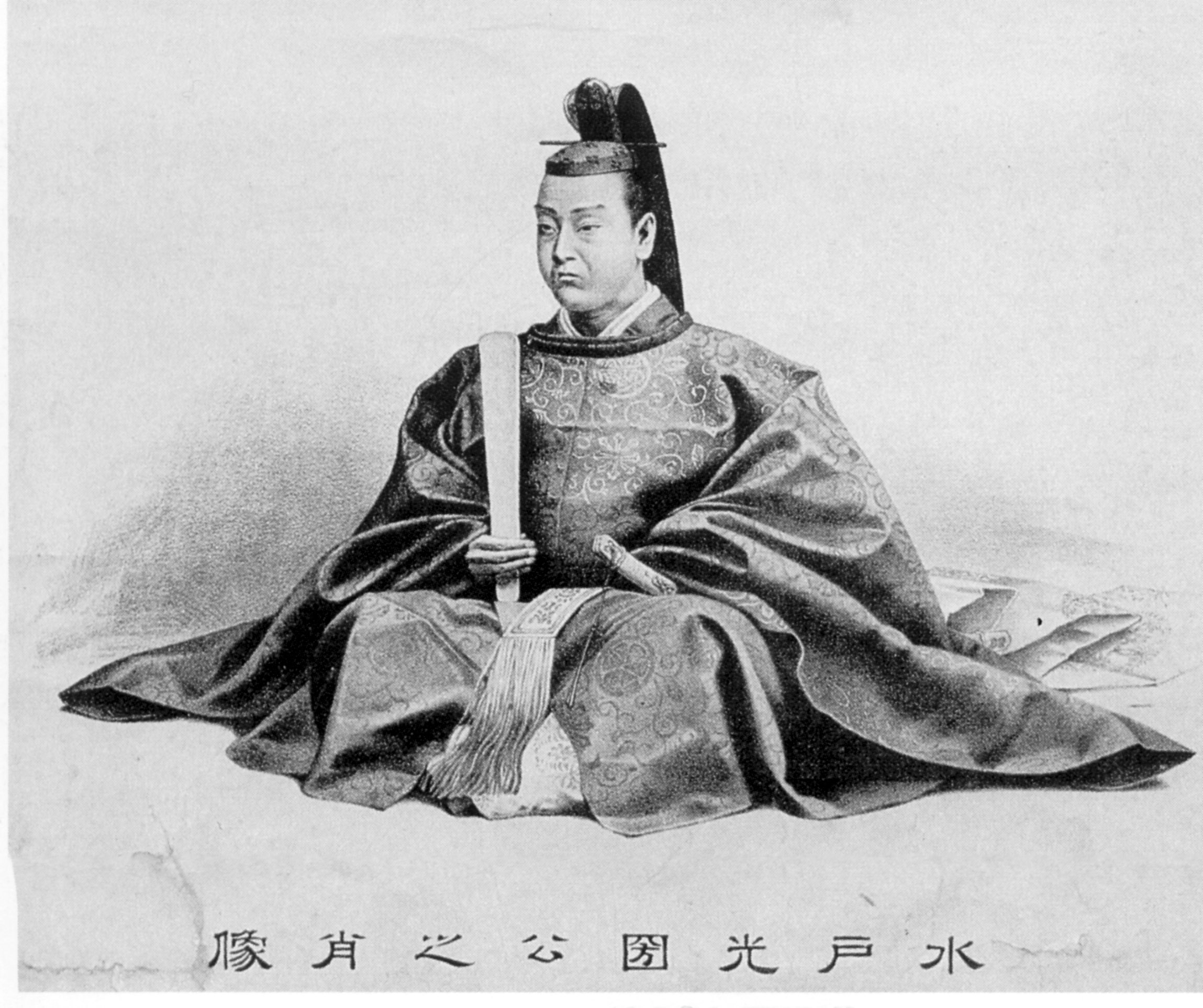 水戸光圀 Mito Mitsukuni a.k.a Tokugawa Mitsukuni.明治時代以降に書かれた肖像画。白黒であることから印刷画または肖像画を写した写真の可能性あり。